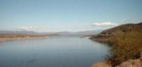 Roosevelt Lake, Arizona